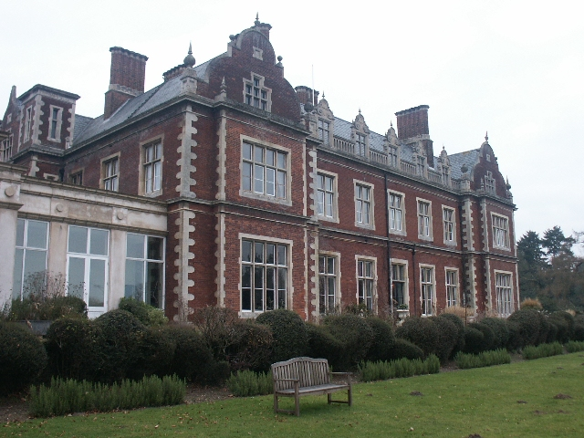 Lynford Hall